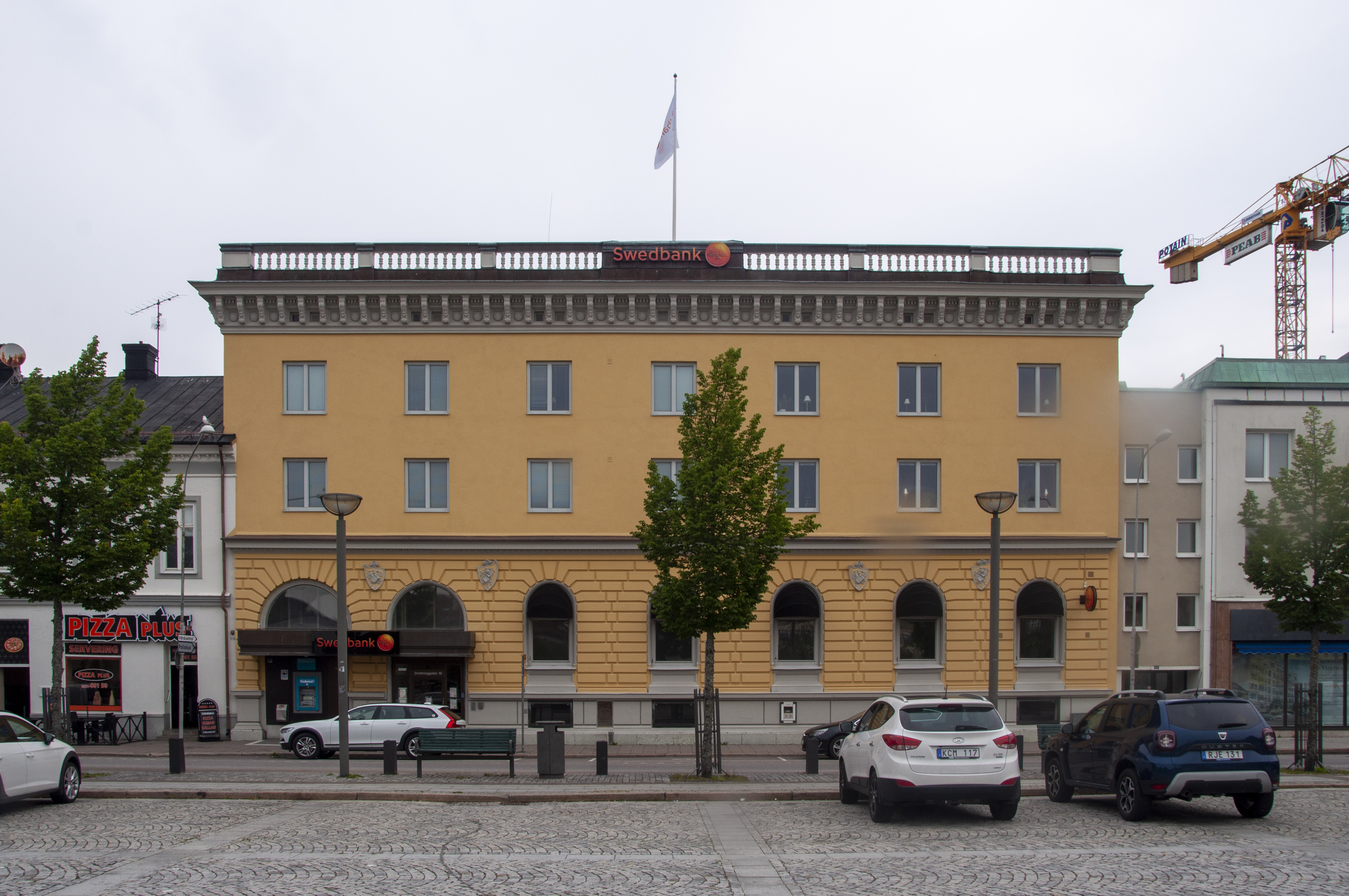 Sparbankshuset, Vänersborg. Nybyggnadsår: 1882-1883. Arkitekter: Belgfrage & Franck (Göteborg) . I en ombyggnad 1948 delades den tidigare höga övervåningen i två våningsplan.